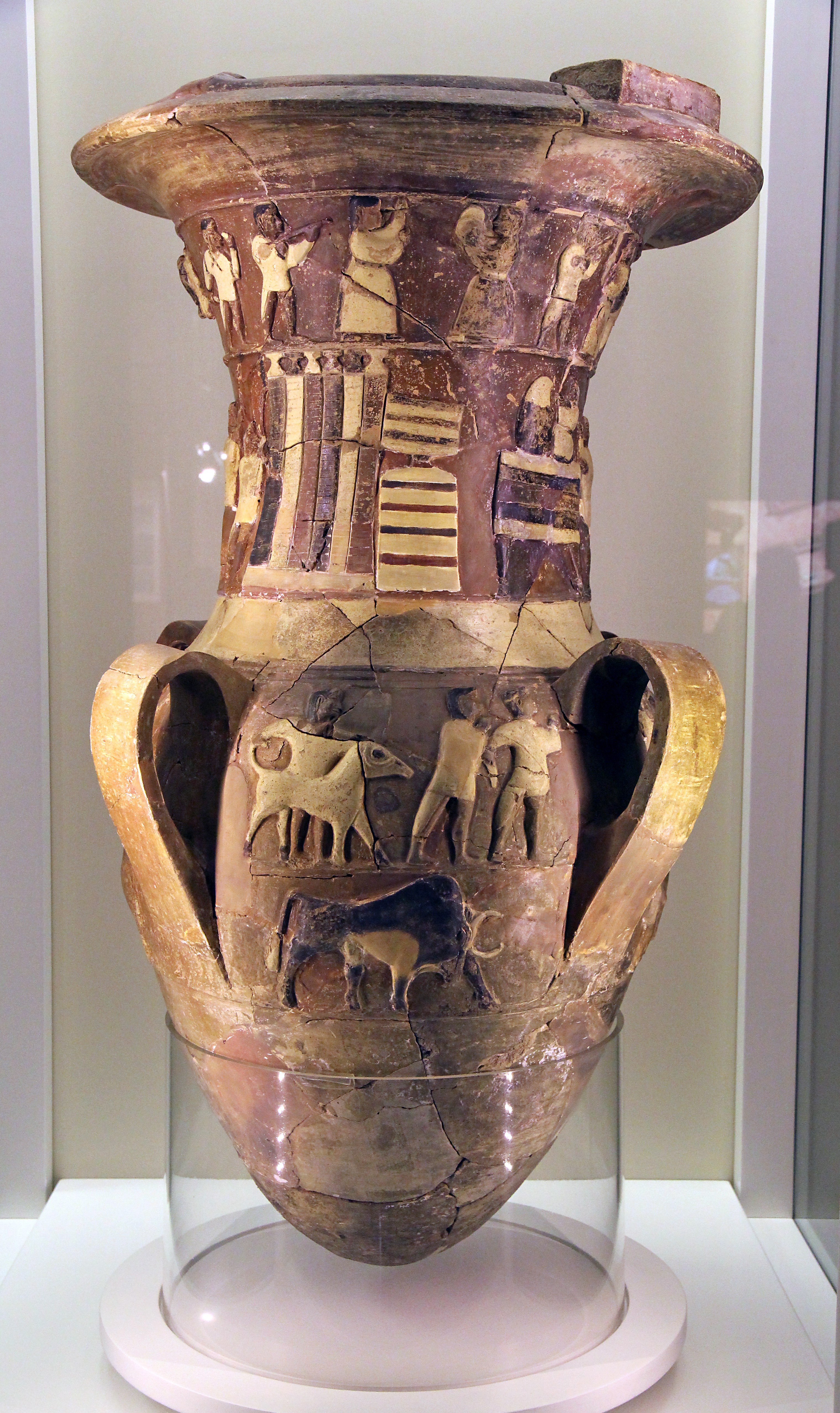 Archäologisches Museum Çorum, Zentraltürkei, frühhethitische Vase A aus Hüseyindede